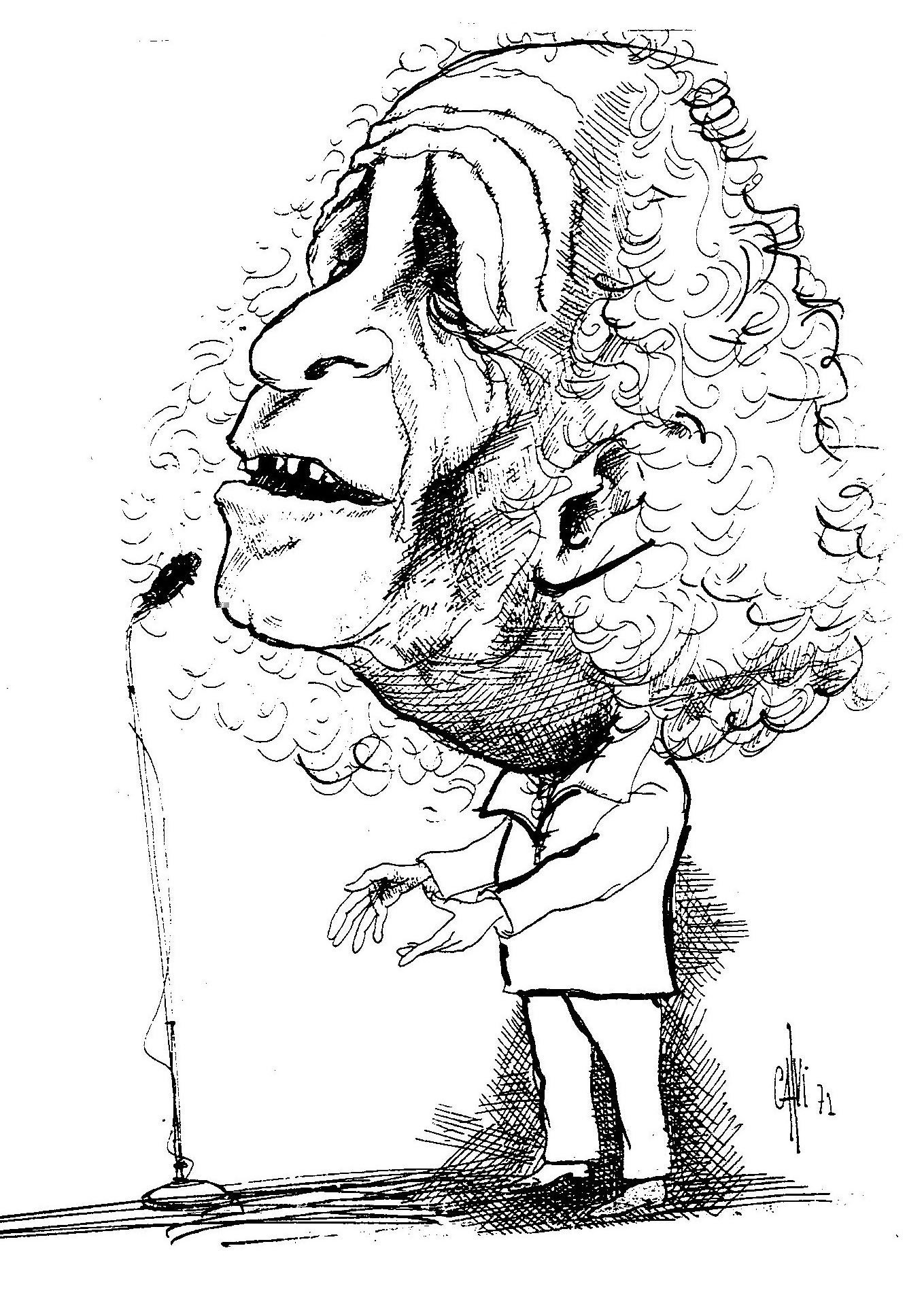 Léo Ferré